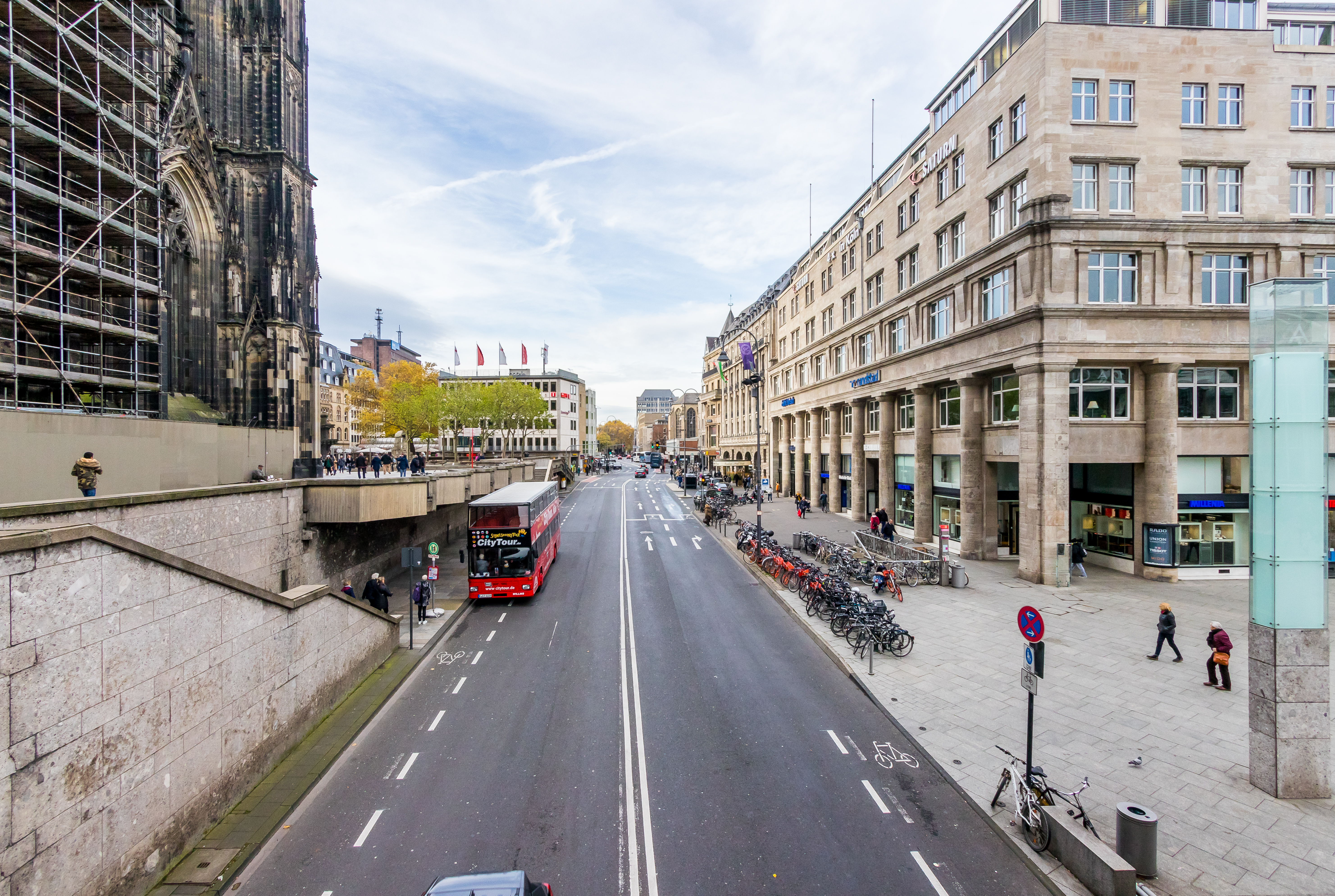 Trankgasse Köln zwischen Dom und Deichmannhaus. Blick Richtung Westen. Auf der linken Straßenseite ein Sightseeingbus, rechts der Übergang zum Bahnhofsvorplatz